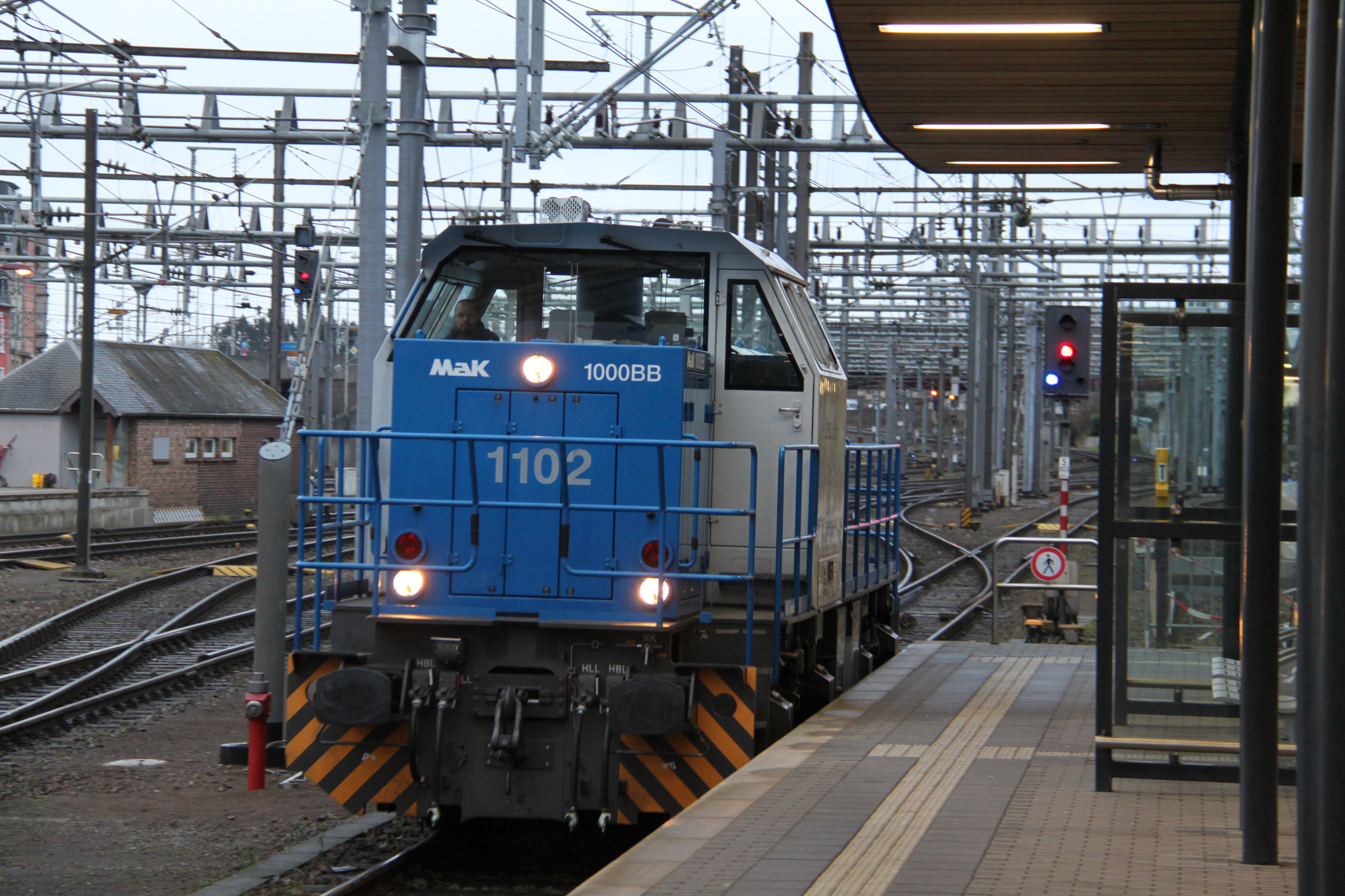 Een 1100-locomotief in het station van Luxembourg.